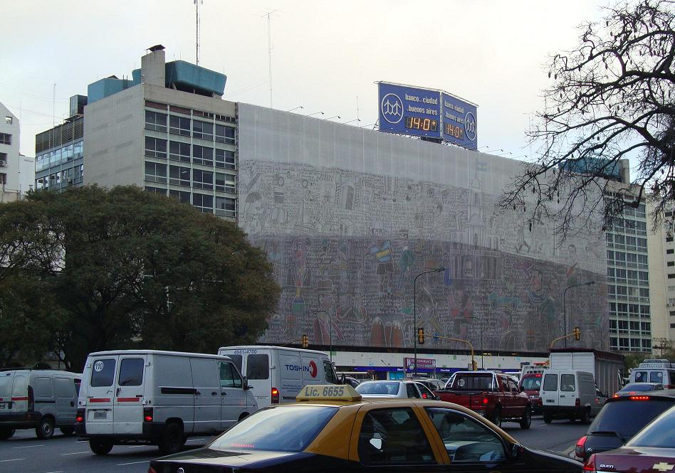 Fachada del Edificio del Plata en la ciudad de Buenos Aires. Carlos Pellegrini 211 (entre Juan D. Perón y Sarmiento). Gigantografía de la obra “Los mitos de mi infancia”, de Antonio Seguí.